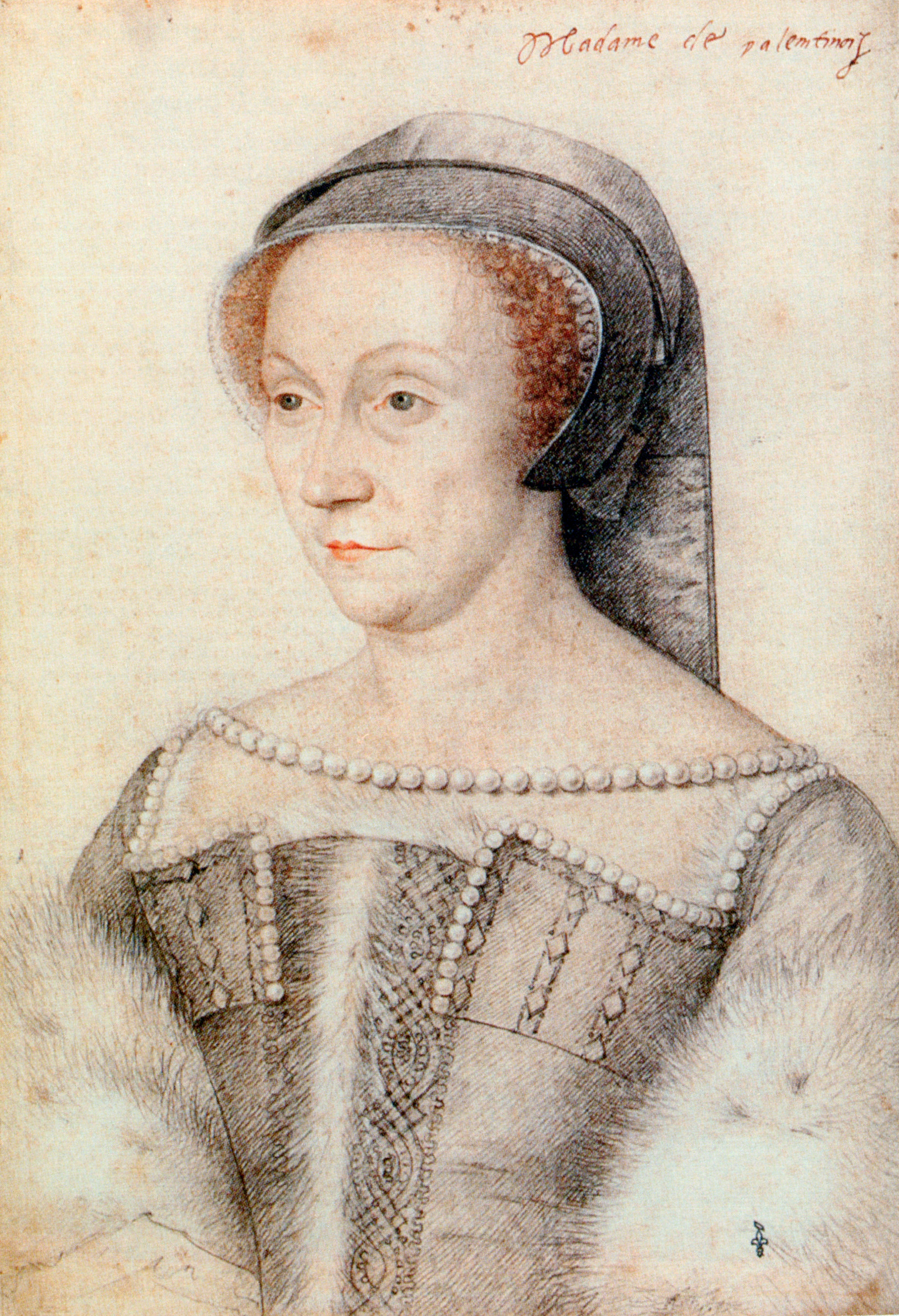 Diane de Poitiers duchesse de Valentinois (1499-1566), Chantilly, musée Condé, inv. MN 204